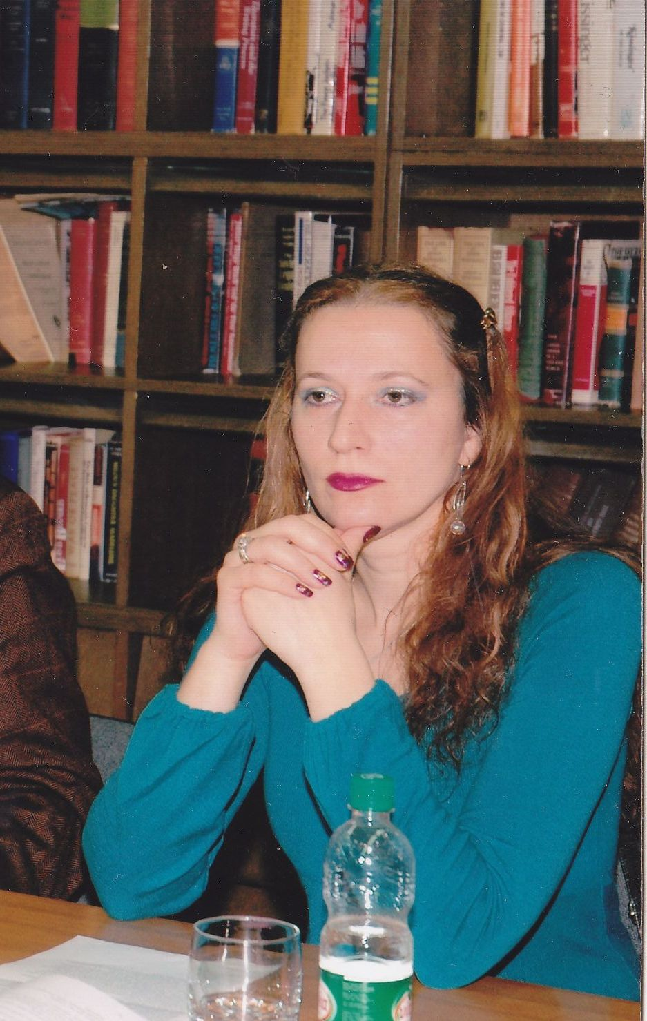 knjizevnica Aleksandra Cvorovic na knjizevnoj veceri u NUBRS